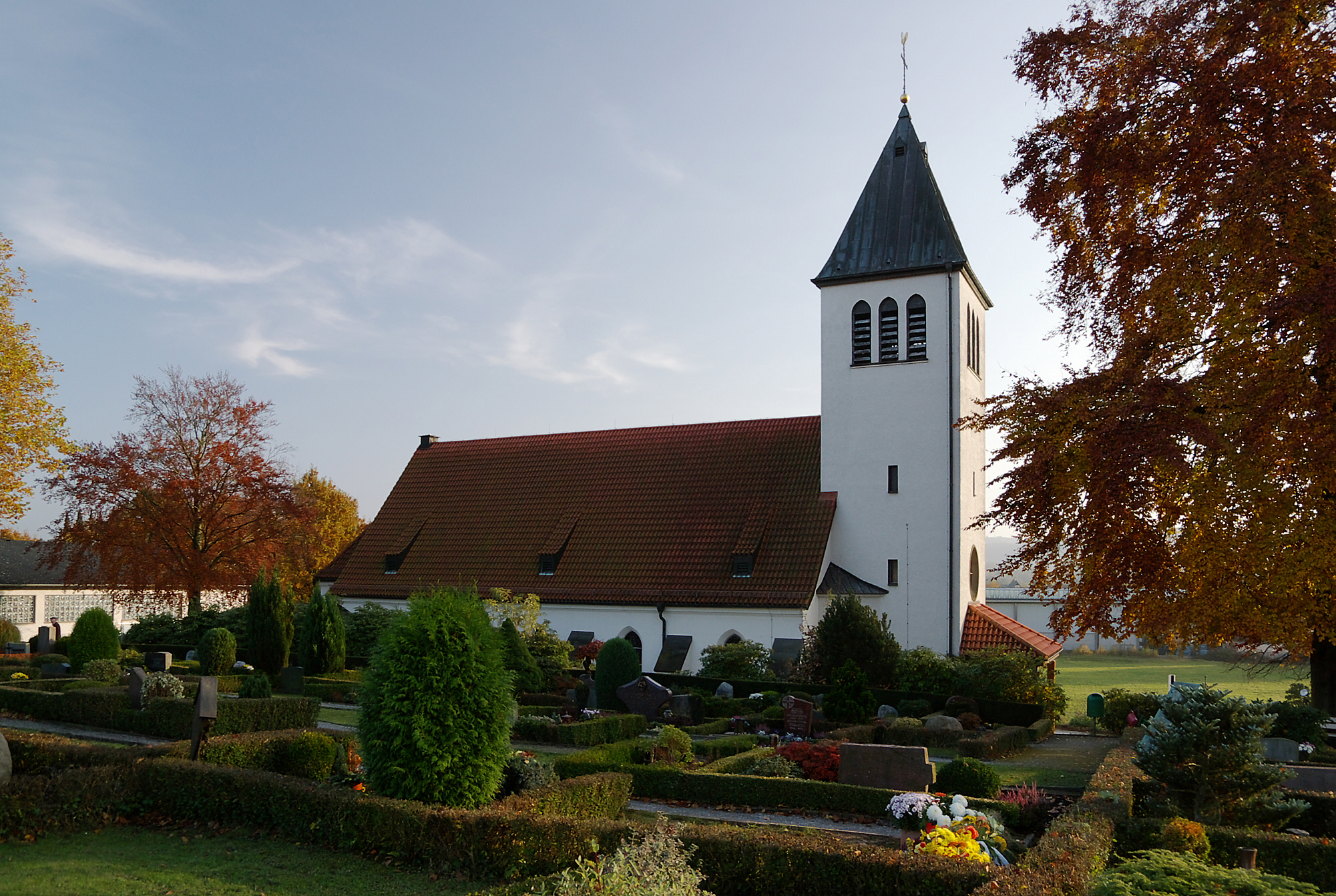 Katholische Kirche Christ-König in Fröndenberg-Warmen, Nordrhein-Westfalen, Deutschland.